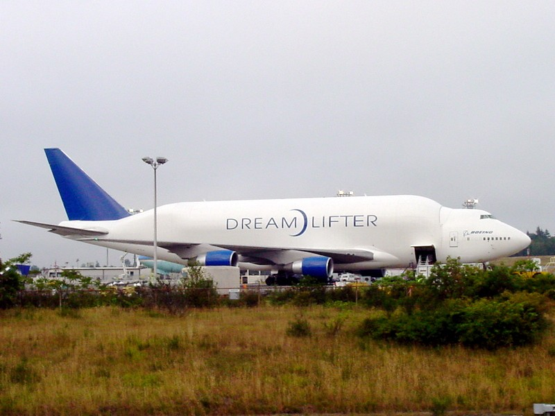 Boeing 747 LCF DreamLifter No.2 N780BA at Paine Field Airport